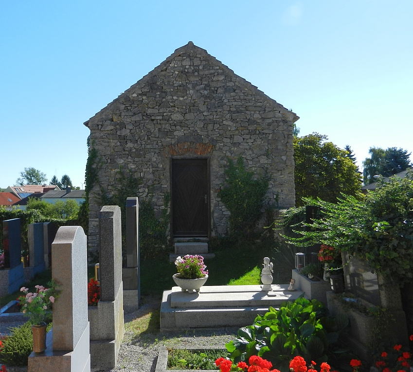 Karner, sog. Totenhaus in Arbesthal.